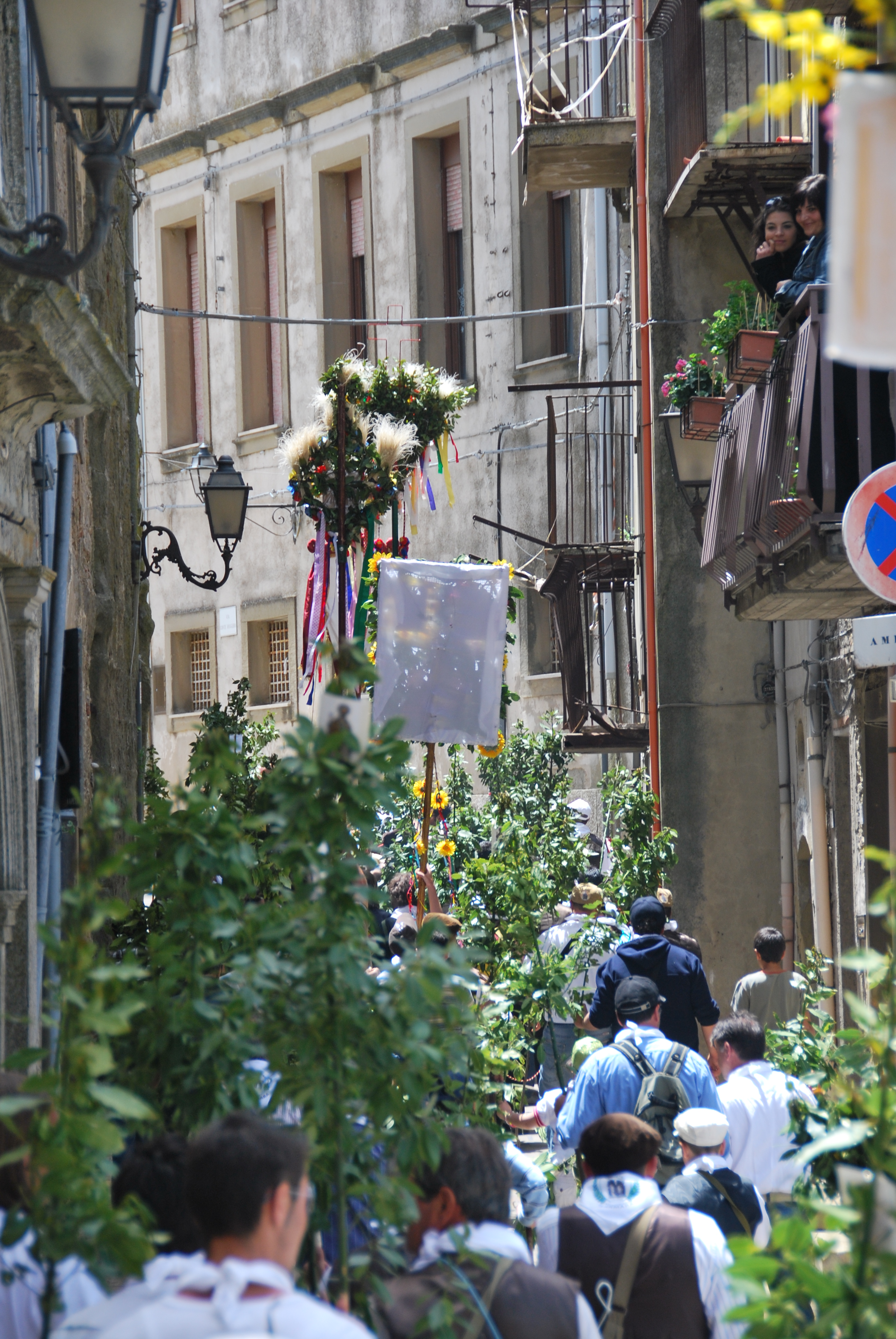 Troina - Festa dei Ramari per S.Silvestro: Un fiume di rami d'alloro